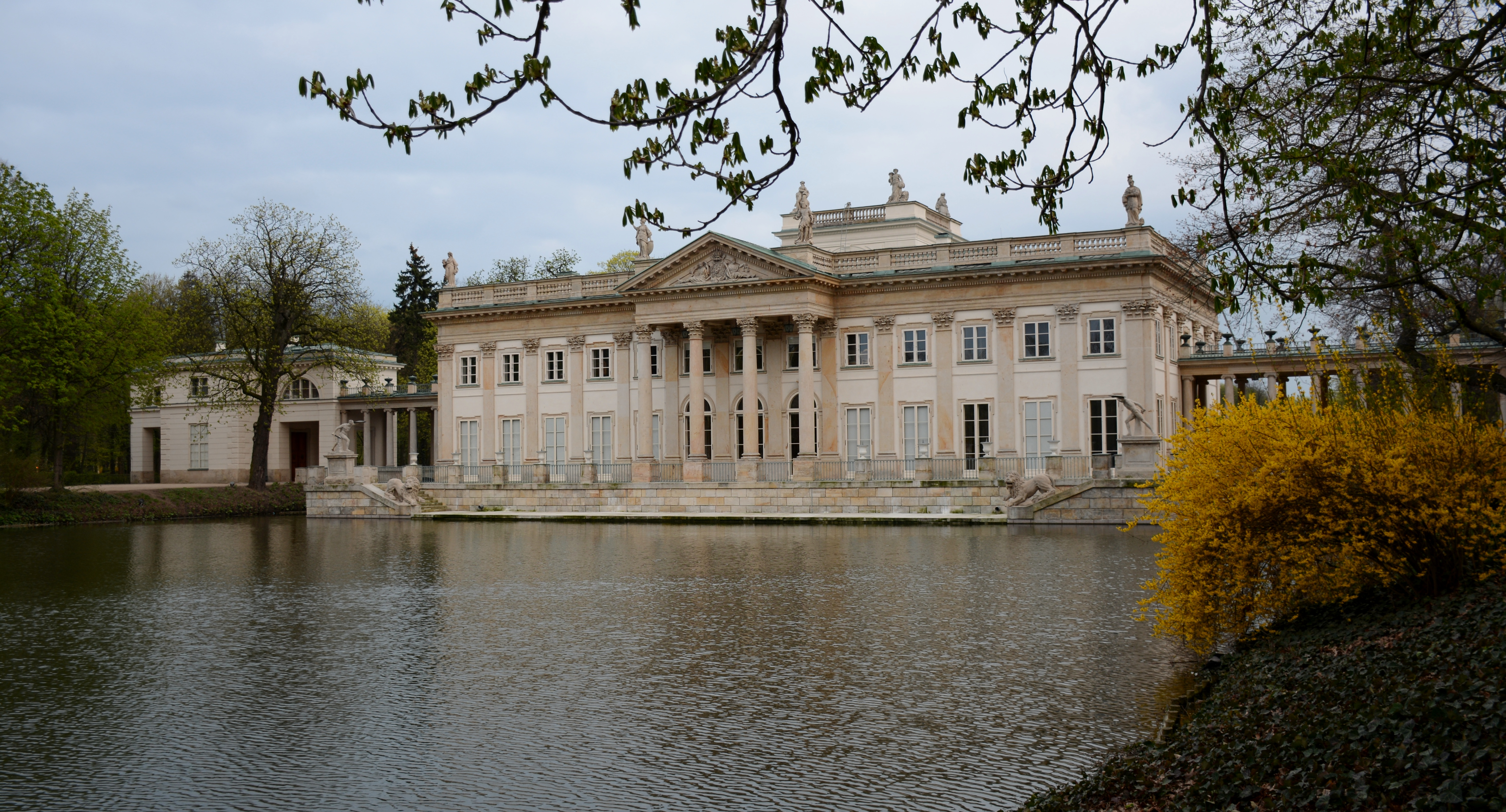 Ujazdów, Warszawa, Poland